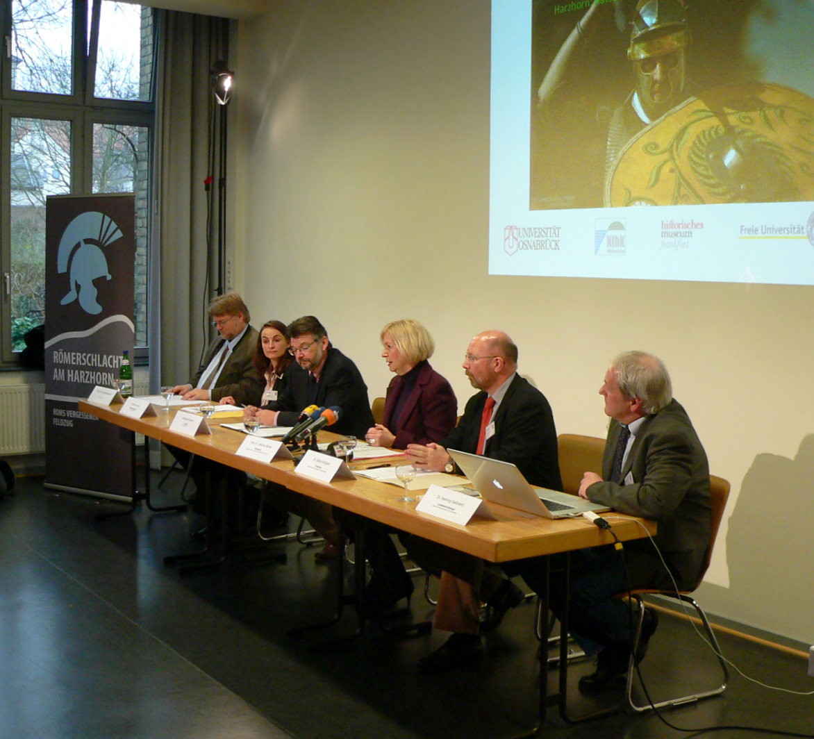 Pressekonferenz im Niedersächsischen Landesamt für Denkmalpflege zum Römischen Schlachtfeld bei Kalefeld